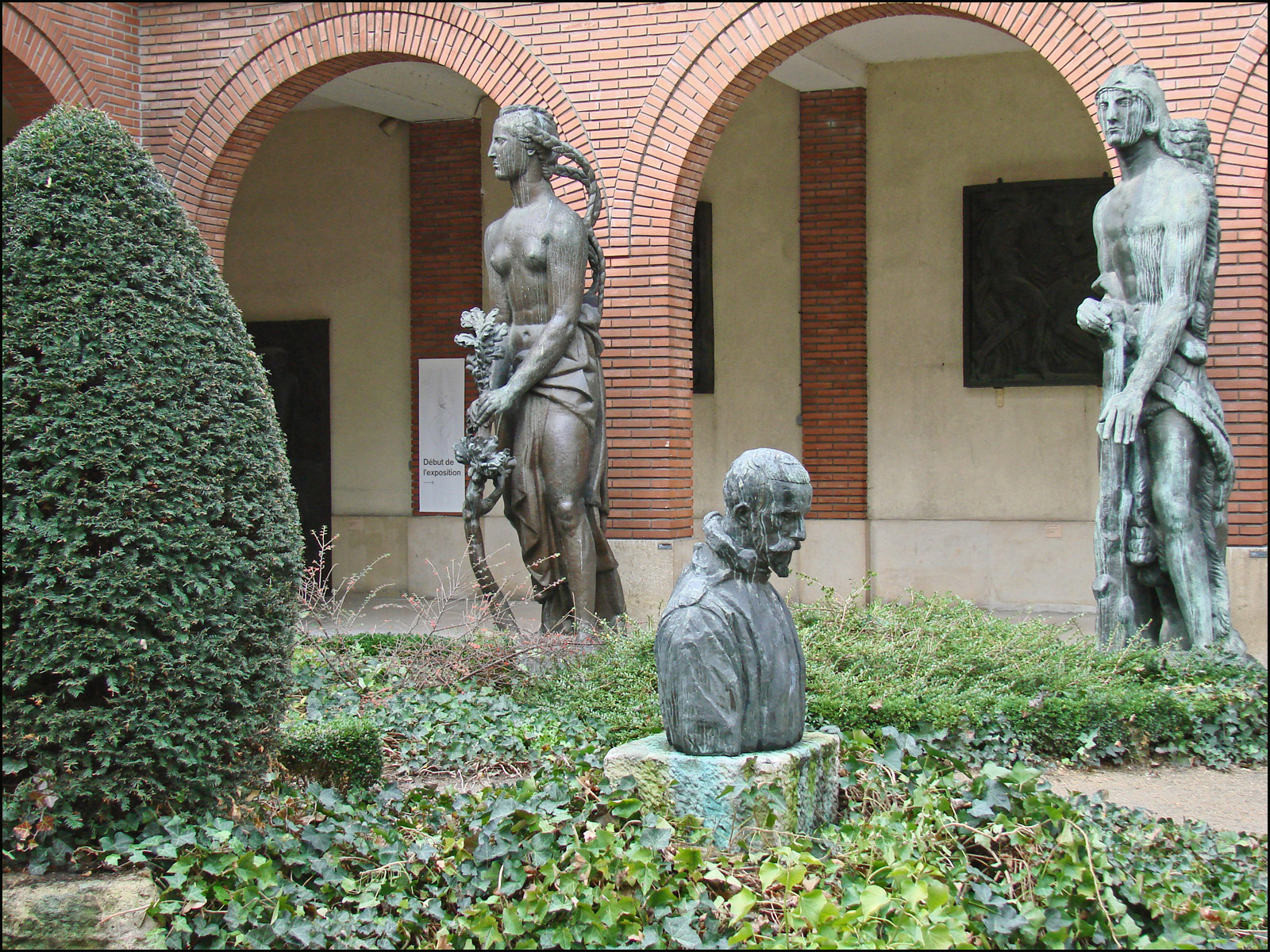 Le jardin sur la rue du musée Bourdelle Ce jardin, que rythme une arcature en briques, allusion à Montauban, ville natale de Bourdelle, permet de retracer le parcours de l’artiste par le biais de pièces monumentales, traductions en bronze des plâtres présentés dans le Grand Hall (extrait du site officiel)